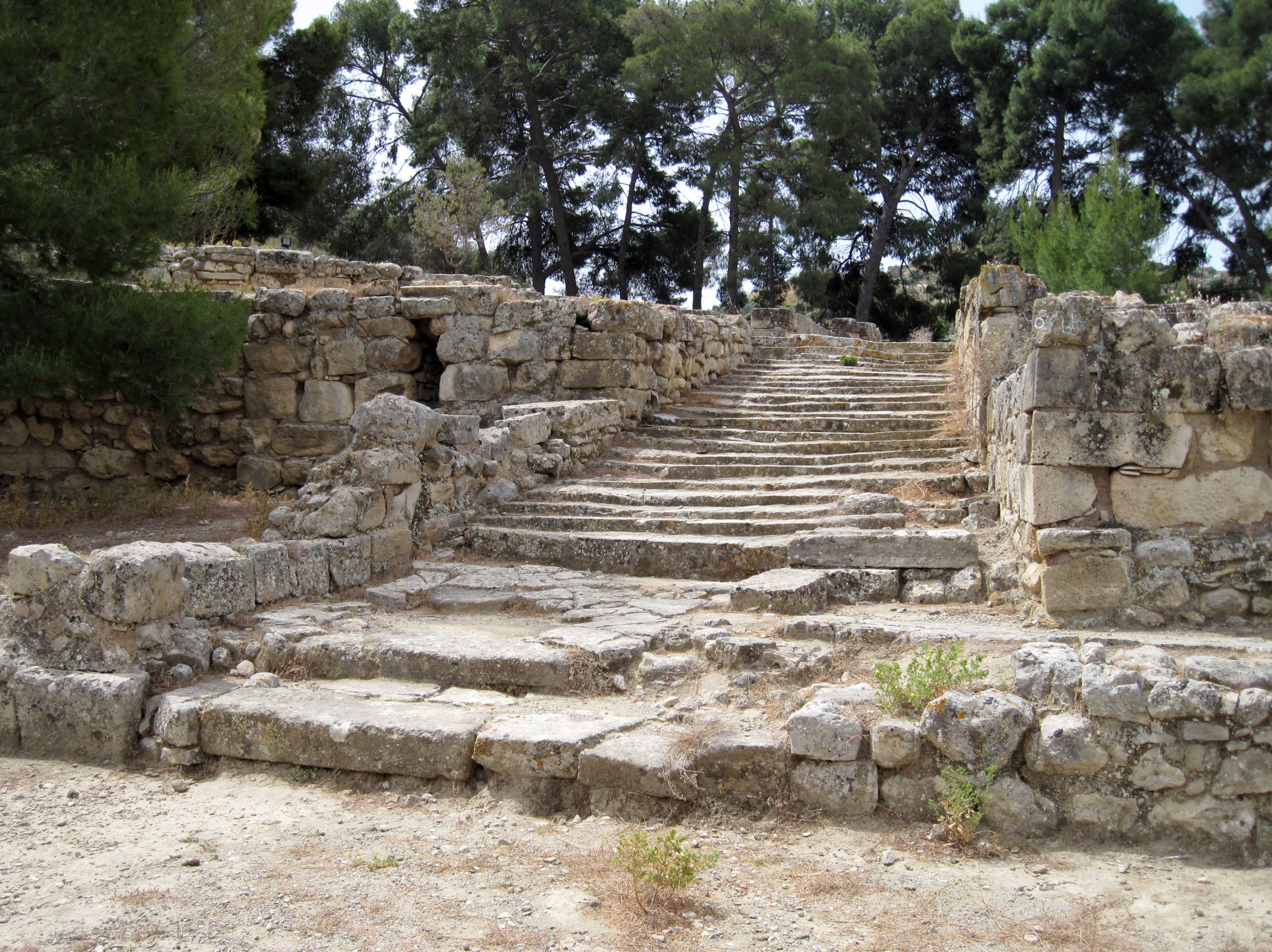 Treppe in der Ausgrabungsstätte von Agia Triada in der Gemeinde Festos, Regionalbezirk Iraklio, Kreta, Griechenland